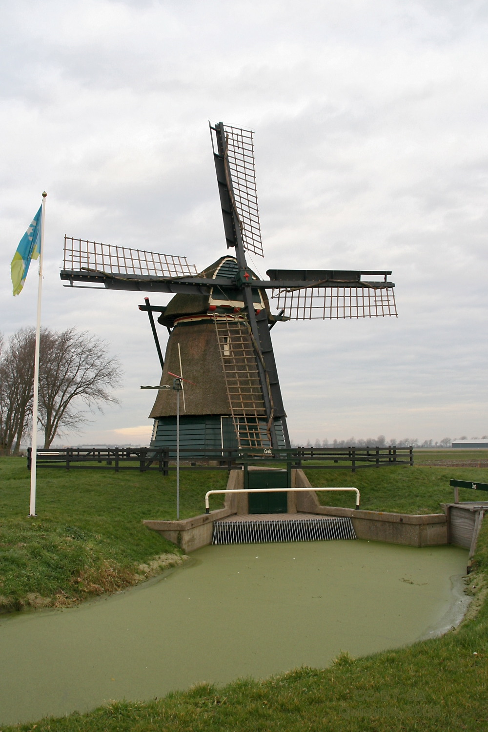 Schoorldam: Grebmolen